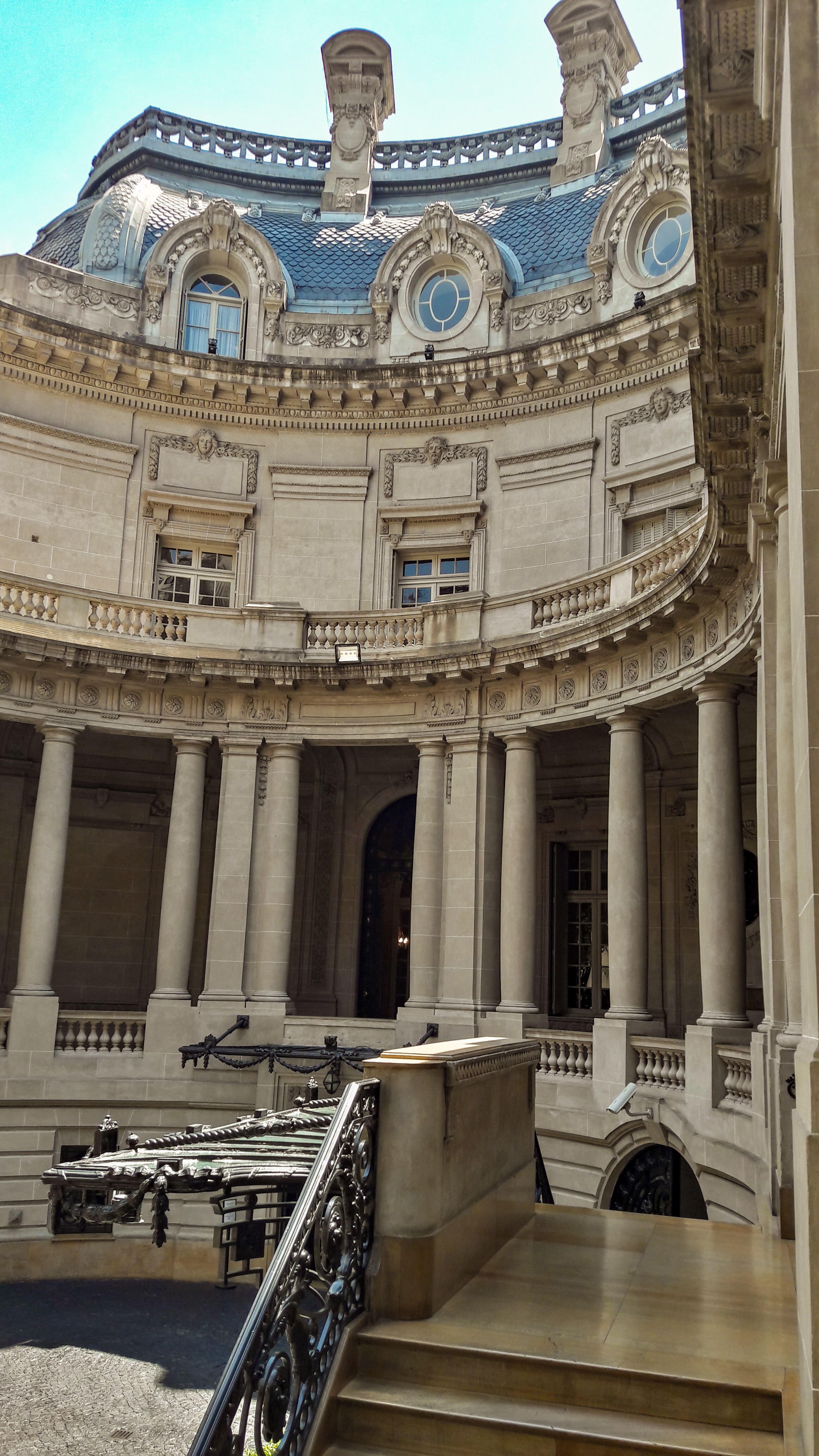 Vista desde la galería del primer nivel hacia uno de los lados internos del palacio